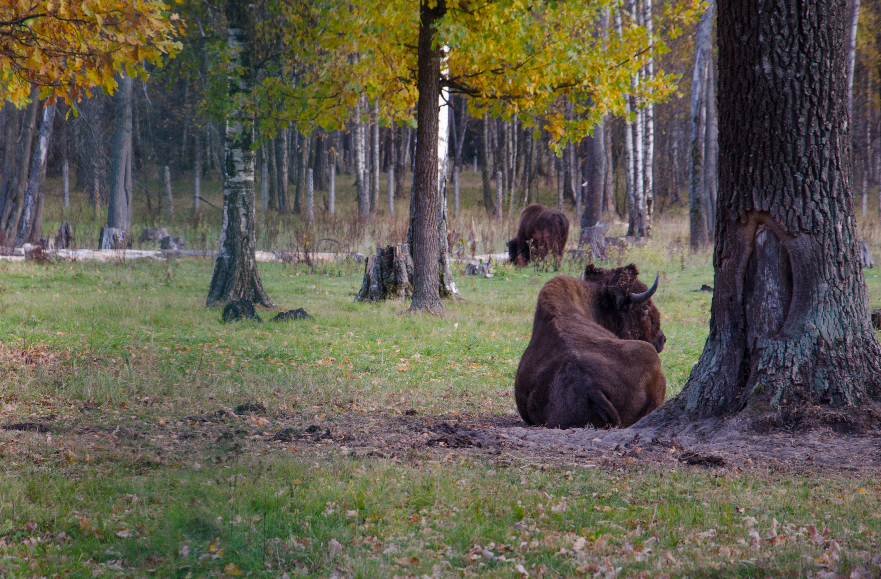 Зубры в питомнике. Приокско-Террасный заповедник: 37°50’ восточной долготы, Серпуховский район, Московская область This image is related to the protected area of Russia number 5000268